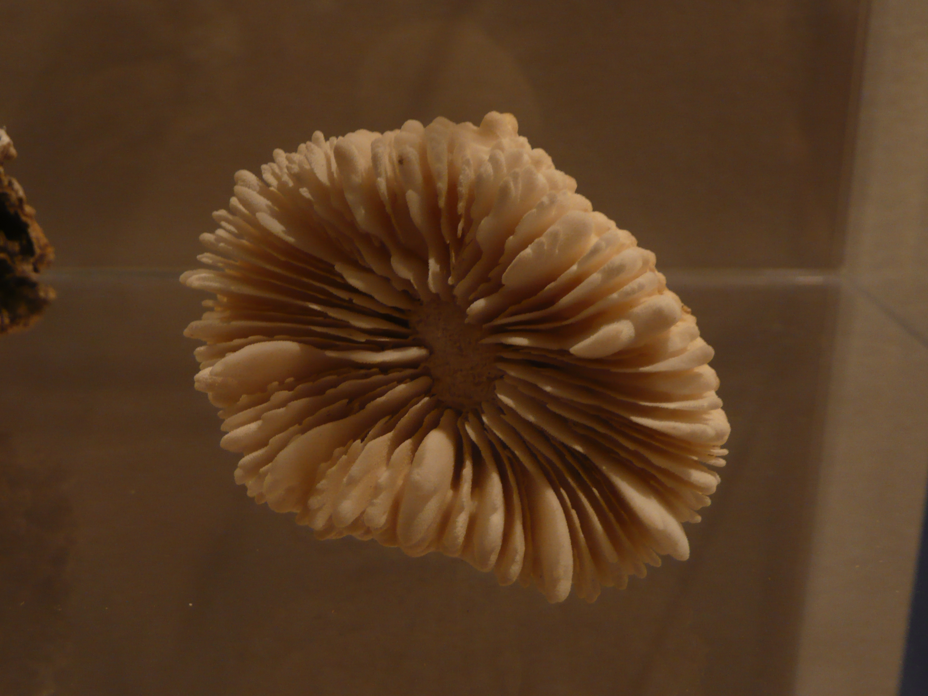 Cynarina lacrymalis in Aquarium tropical du Palais de la Porte Dorée